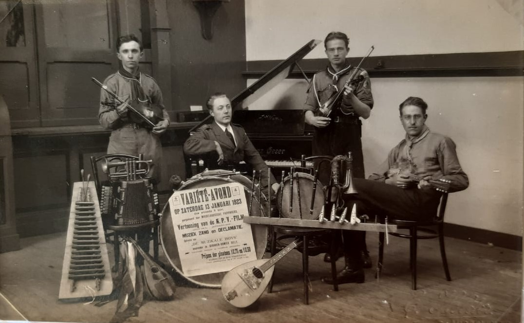 Dit is een ansichtkaart van studio E. Helder te Middelburg uit 1923. Op de kaart is afgebeeld de band "De Muzikale Boys" van de Middelburgsche Padvinders.